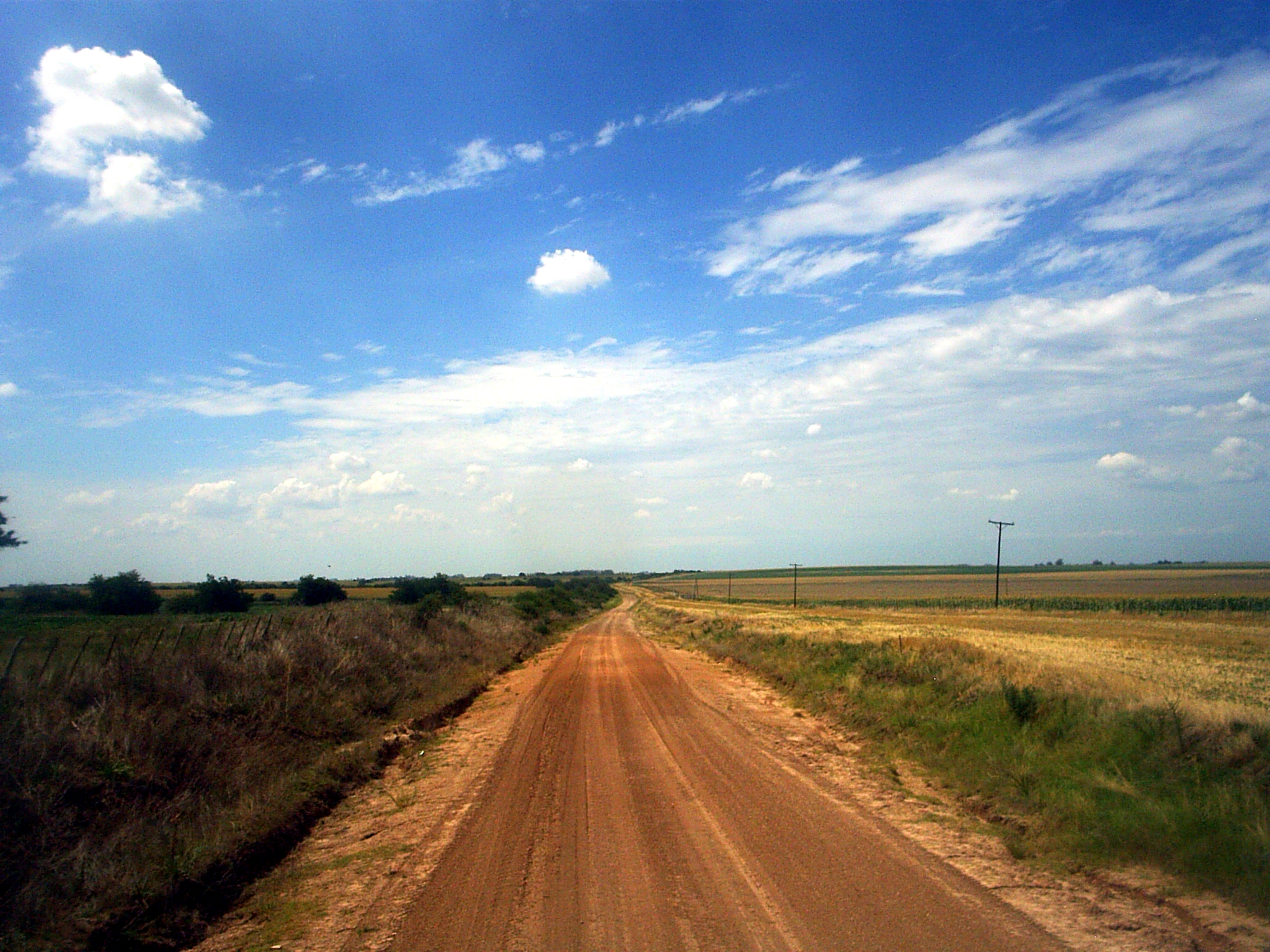 Foto tomada en el camino de la costa, llendo de Gualeguay a la Aldea Asuncion.